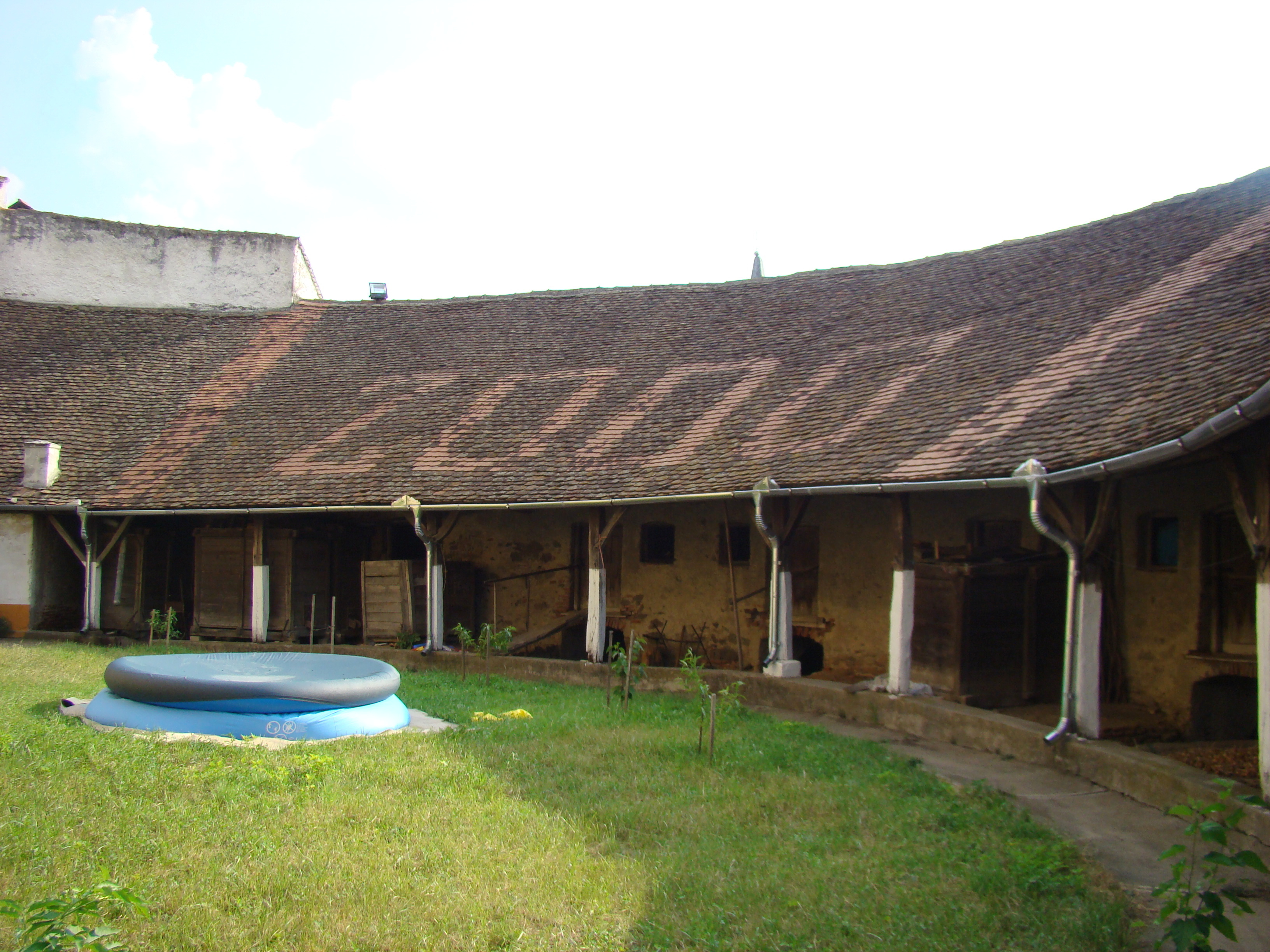 Biserica evanghelică, oraș Miercurea Sibiului, județul Sibiu 01